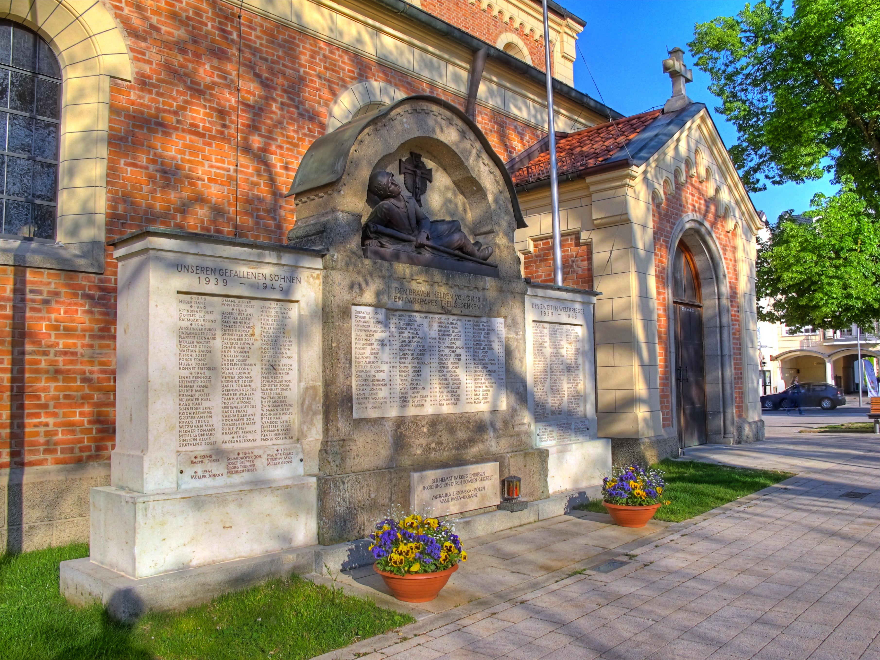 Deutschland, Bayern, Landkreis Fürstenfeldbruck, Gemeinde Olching, Kriegerdenkmal am neugestalteten Nöscherplatz bei der Kirche